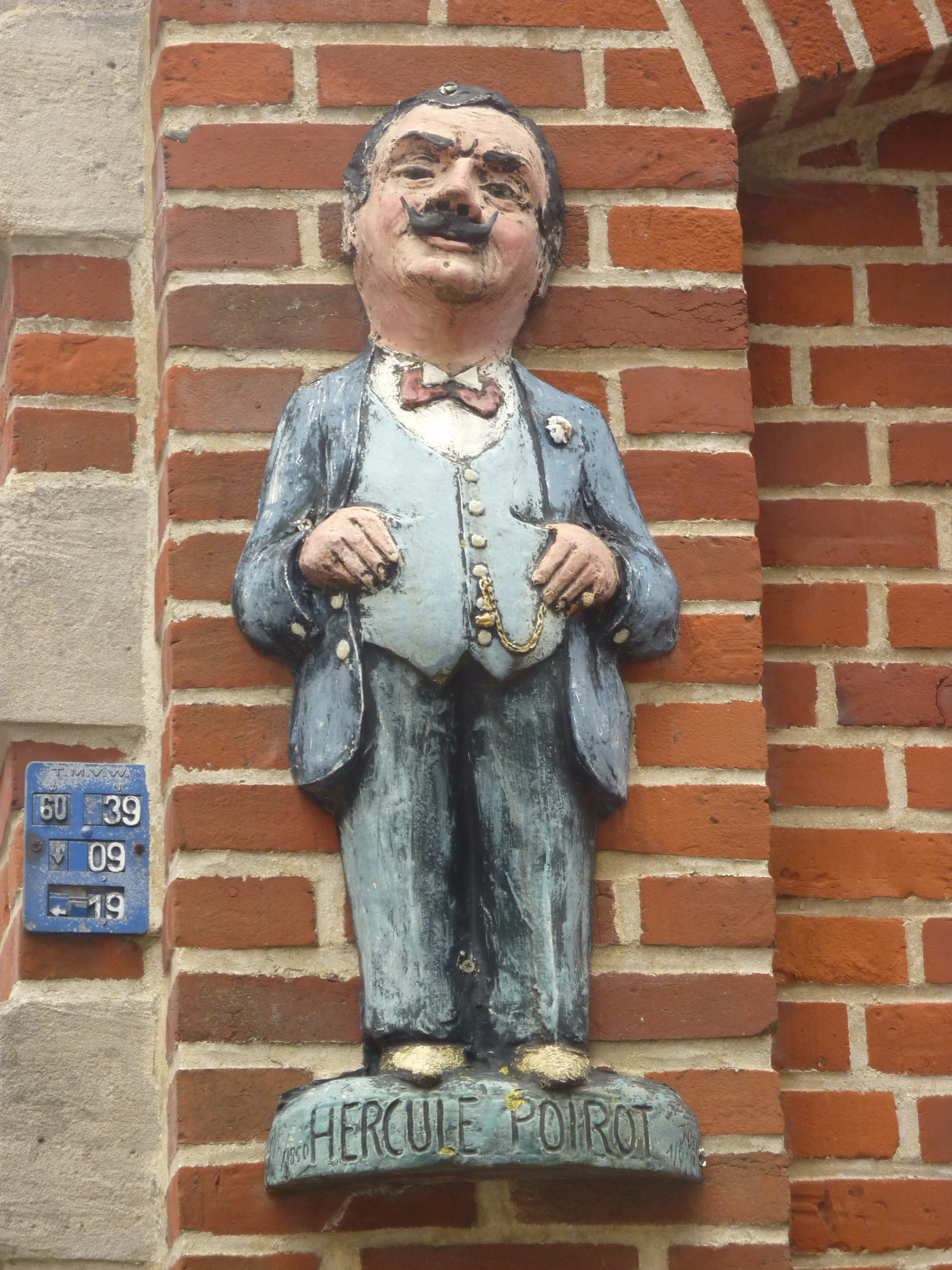 Statue d'Hercule Poirot à Ellezelles, Belgique.